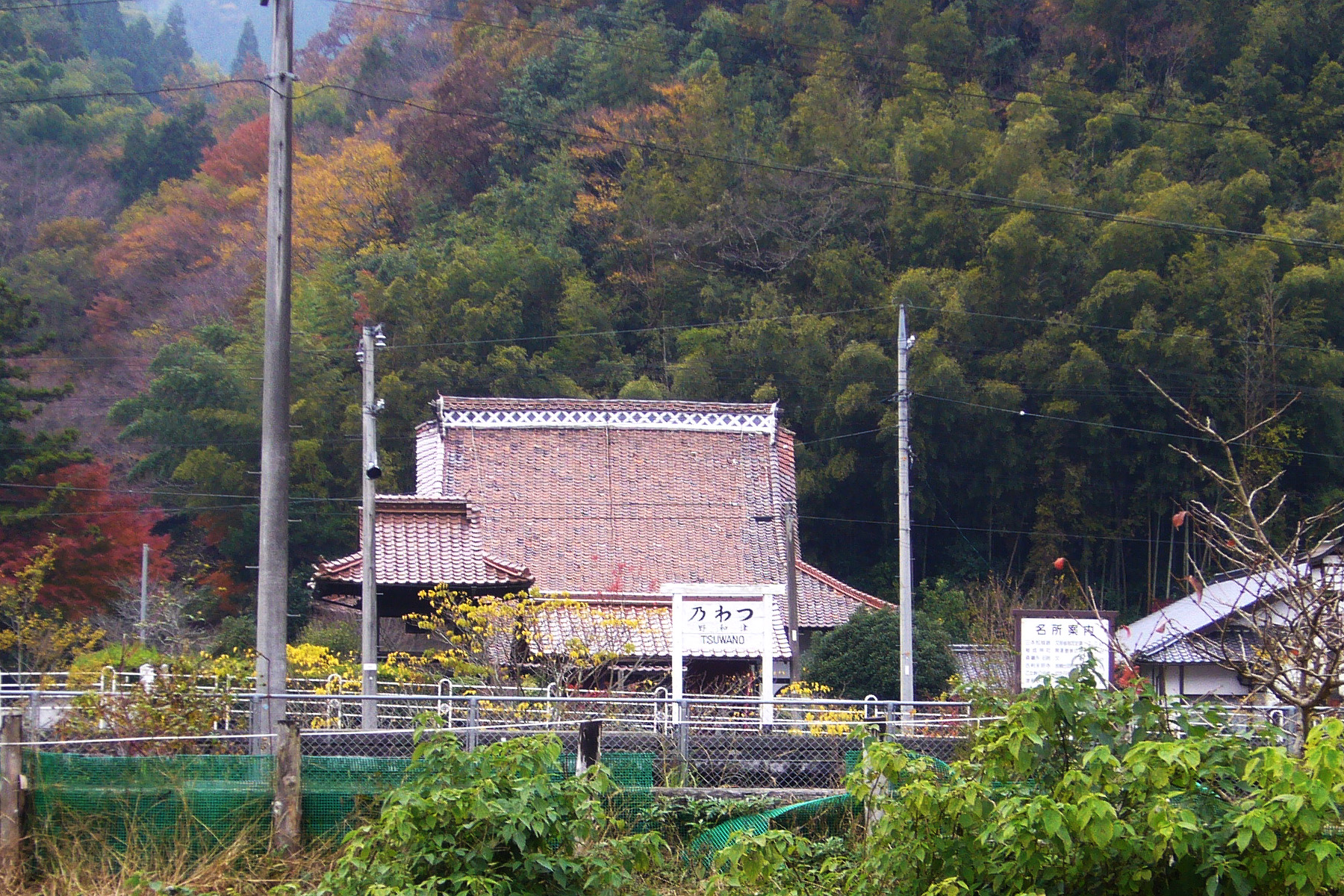 Tsuwano station